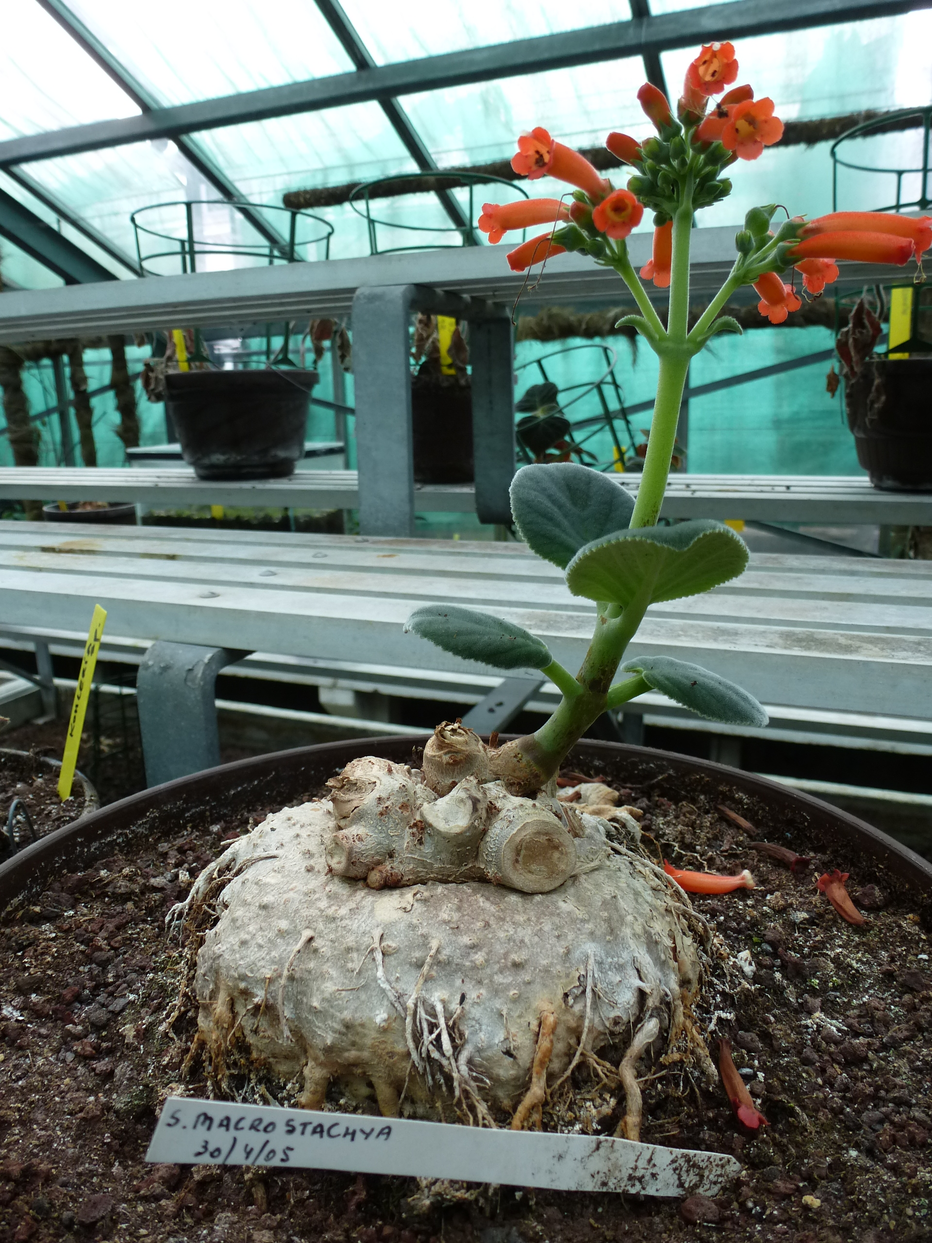 Sinningia macrostachya. Serres d'Auteuil - Jardin botanique de la Ville de Paris - France